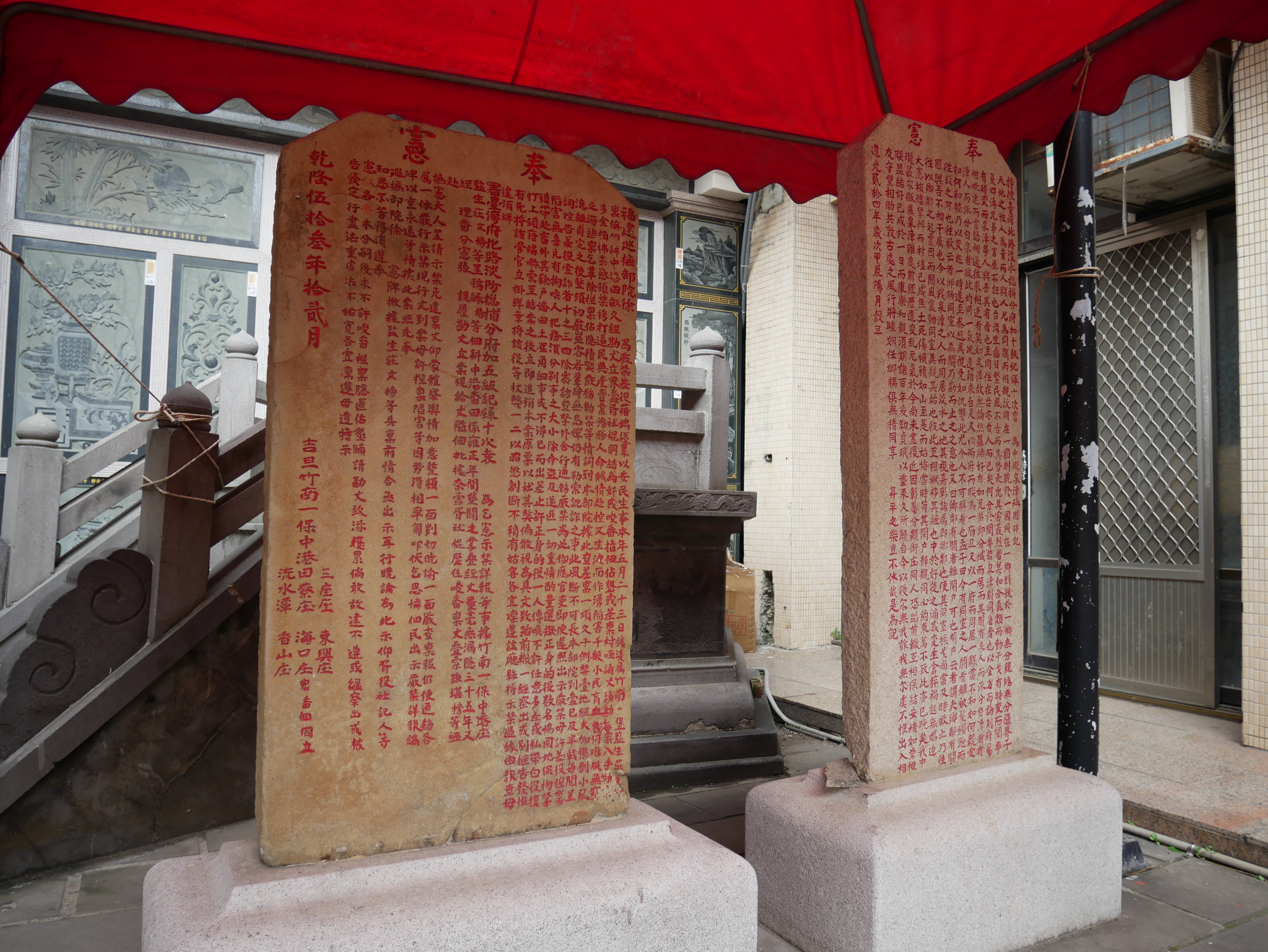 中港慈裕宮所藏石碑，苗栗縣竹南鎮中美里